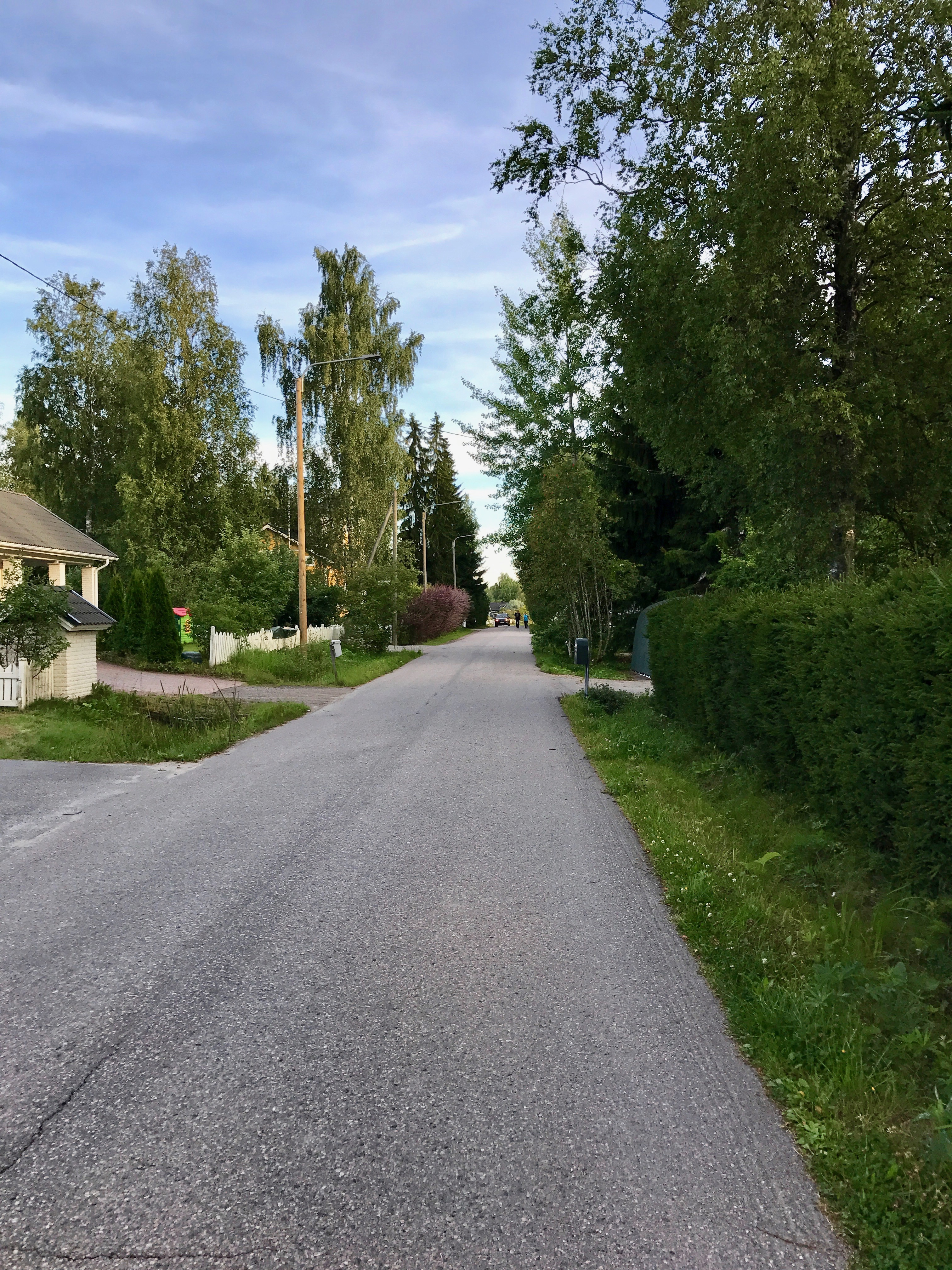 Näkymä Vantaan Koivurinteesä